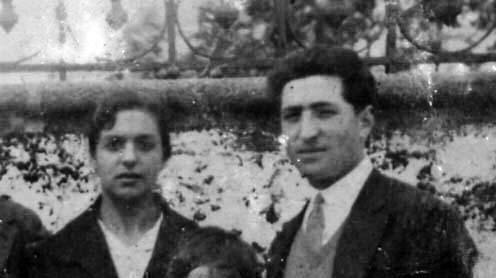 Marcial Villamor e a súa dona Pepita e a súa dona Pepita